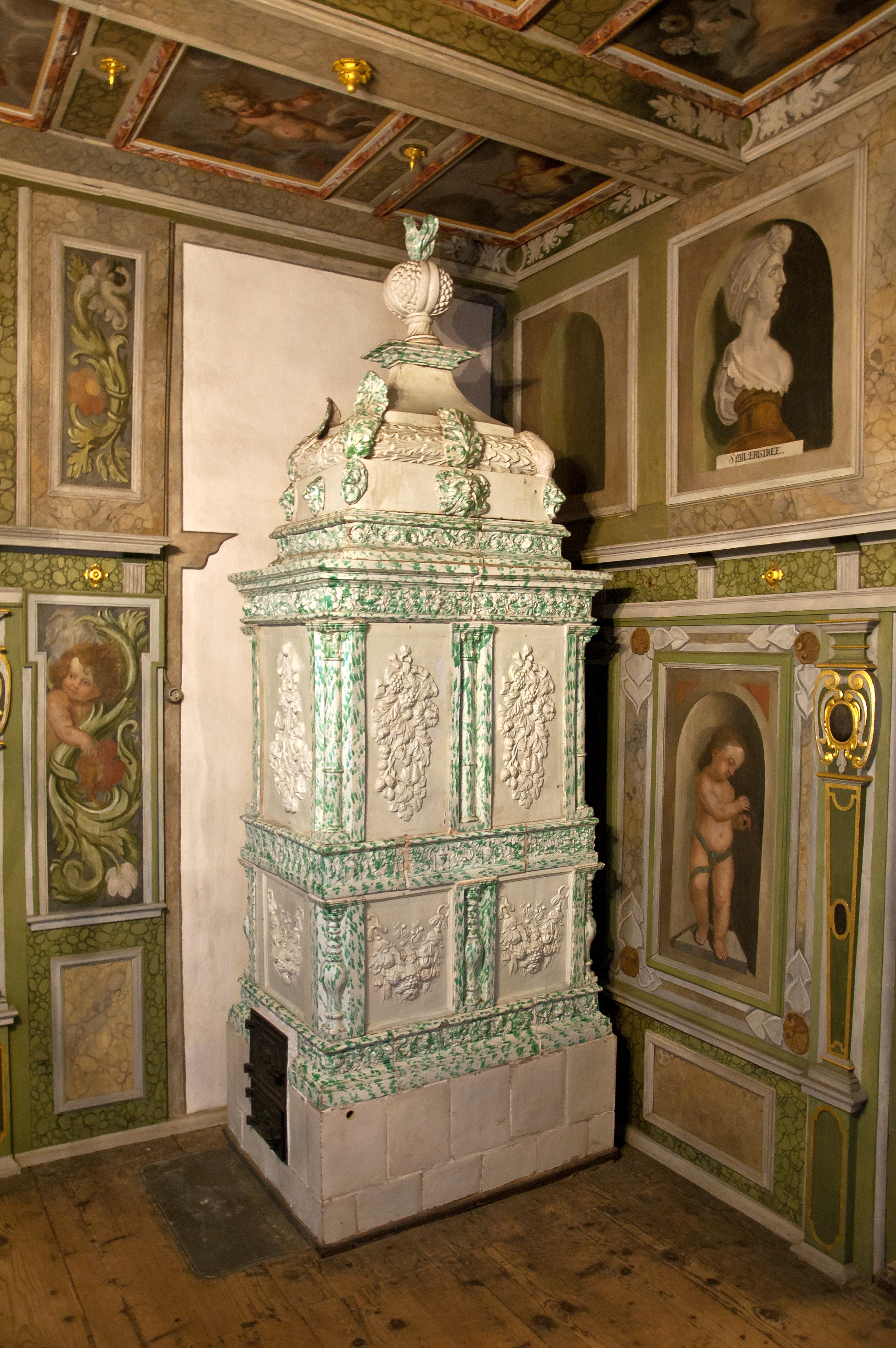 Kachelofen im Weingut Hoflößnitz